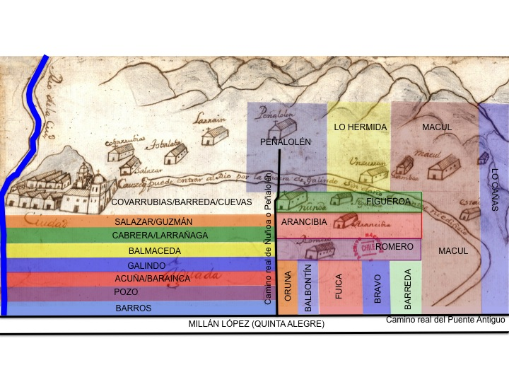 Descripción de chacras de Ñuñoa